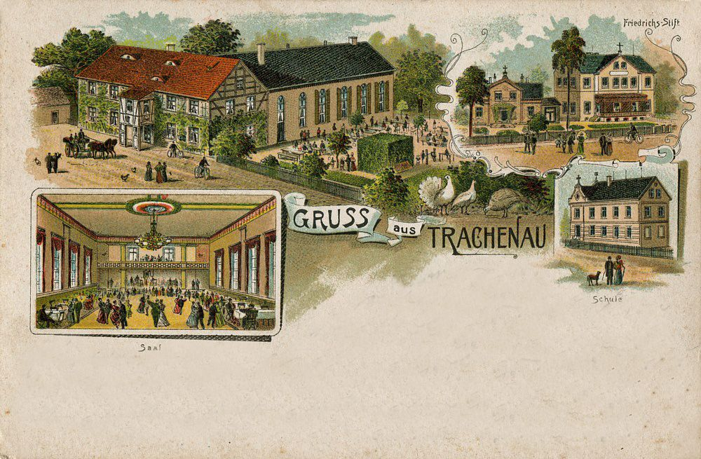 Grußpostkarte aus Trachenau bei Böhlen